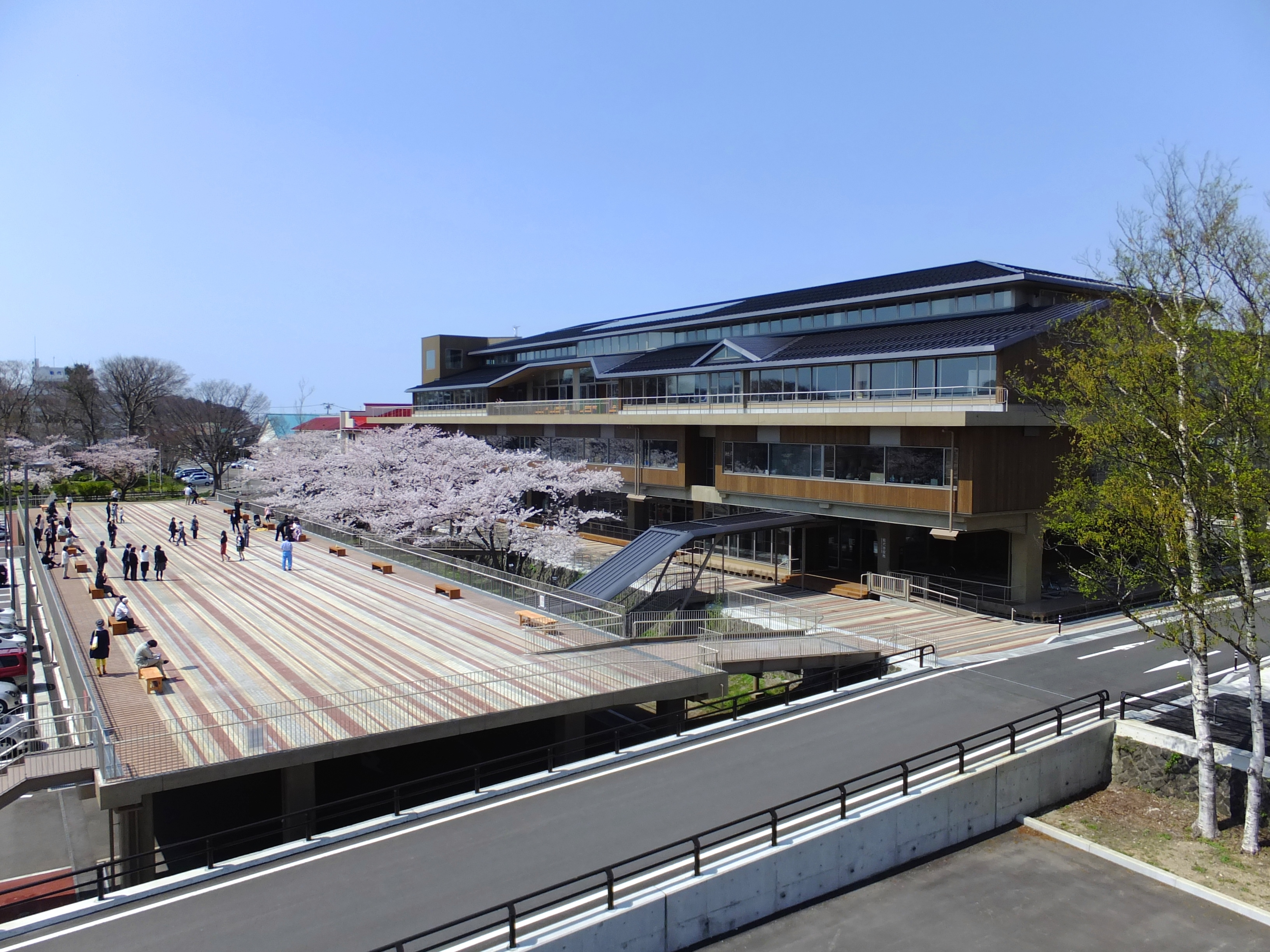 能代市役所仮庁舎（旧渟城第二小学校校舎）から、能代市役所新庁舎とさくら庭を望む。能代市の新庁舎建設に際して、旧渟城第二小学校の桜並木がそのまま残され、それを取り囲むようにテラス状のさくら庭が新たに整備された。